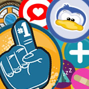 las recompensas tienen que ser un incentivo en sí, aunque sean virtuales